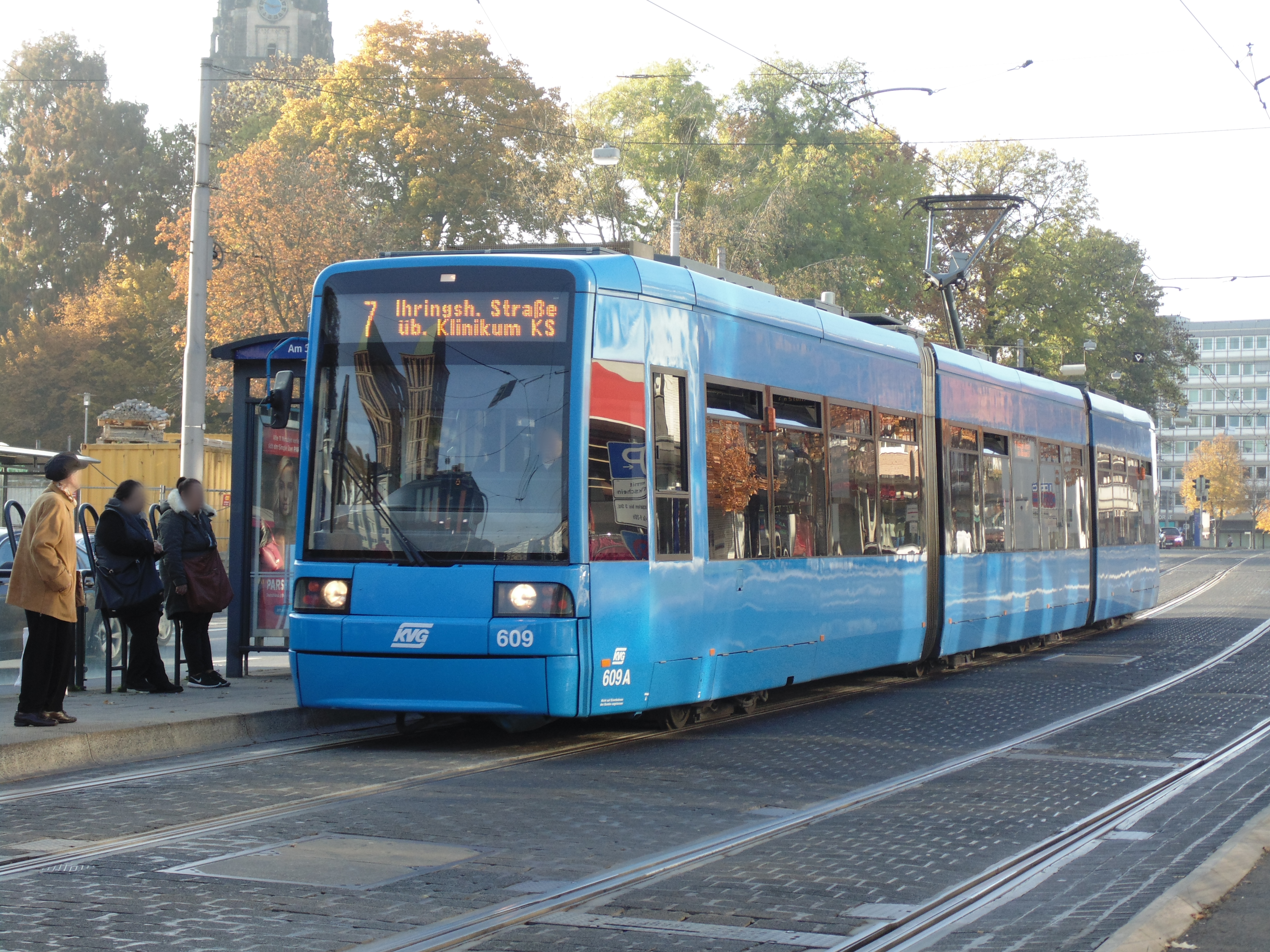 Der 8NGTw 609 der Kasseler Verkehrsgesellschaft (KVG) steht als Linie 7 an der Haltestelle Am Stern.